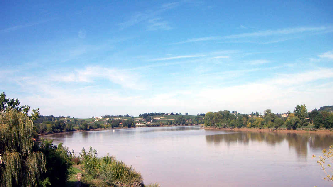 Fronsac Weinbau Dordogne